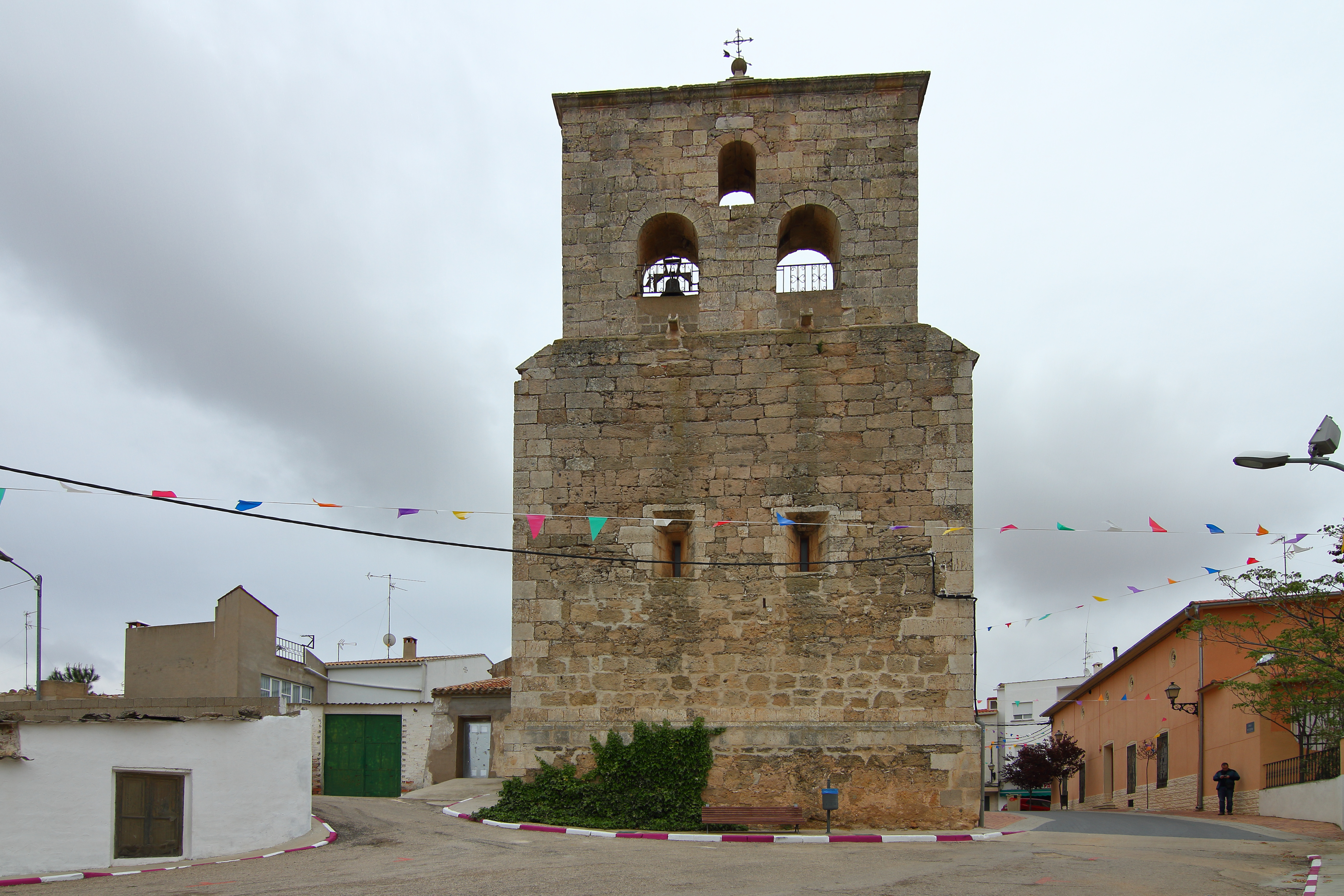 Graja de Iniesta, Iglesia parroquial, espadaña